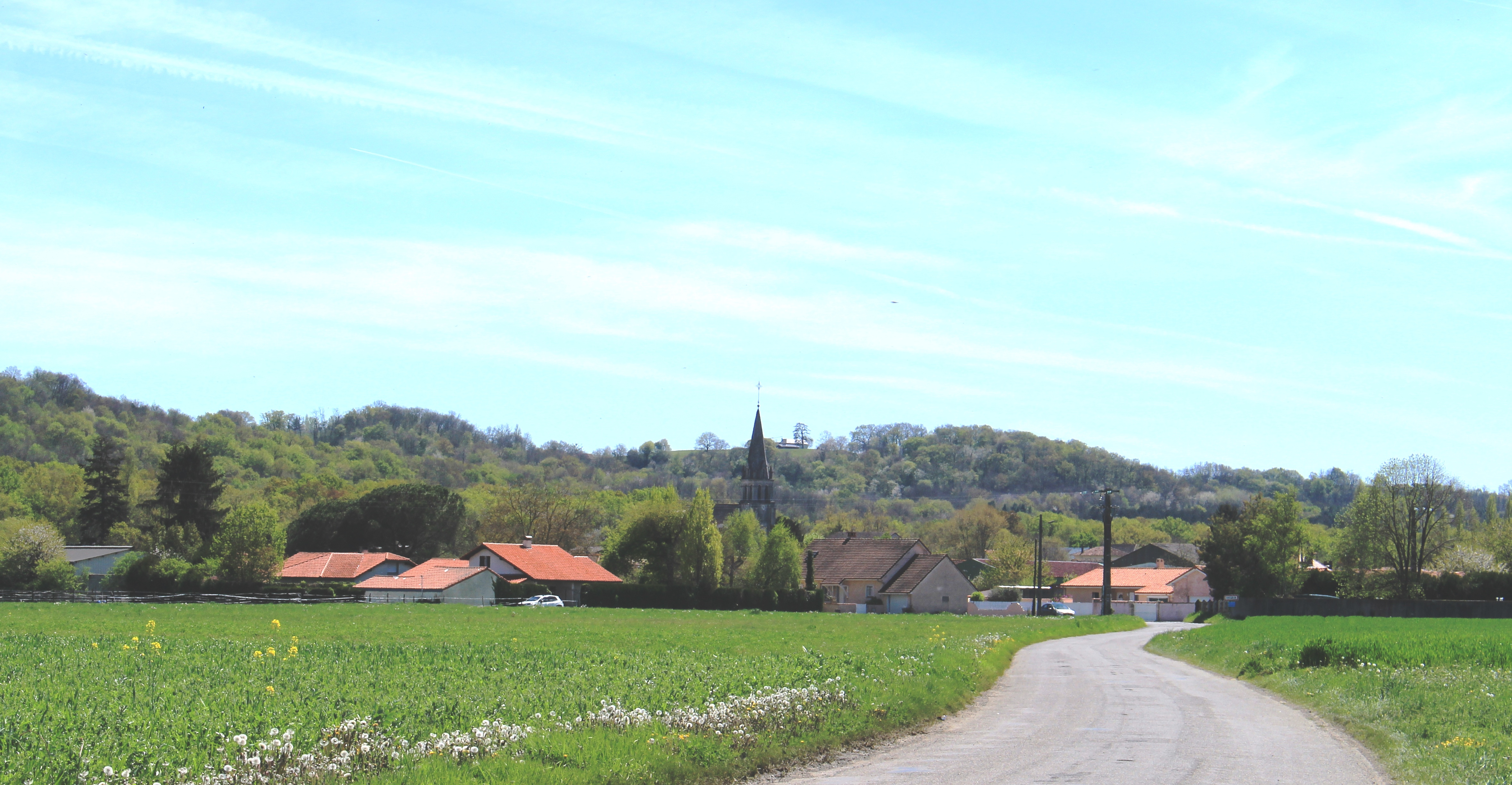 Orleix (Hautes-Pyrénées)